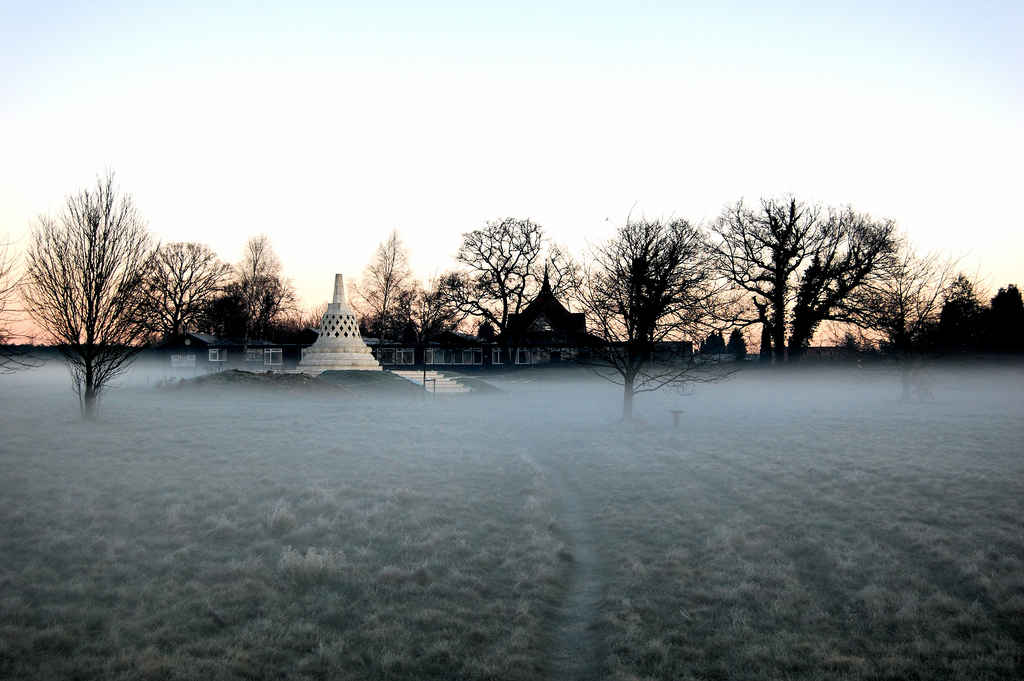 Stupa at Amaravati Buddhist monastery